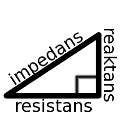 impedanstriangel (bilden skapad av mig)